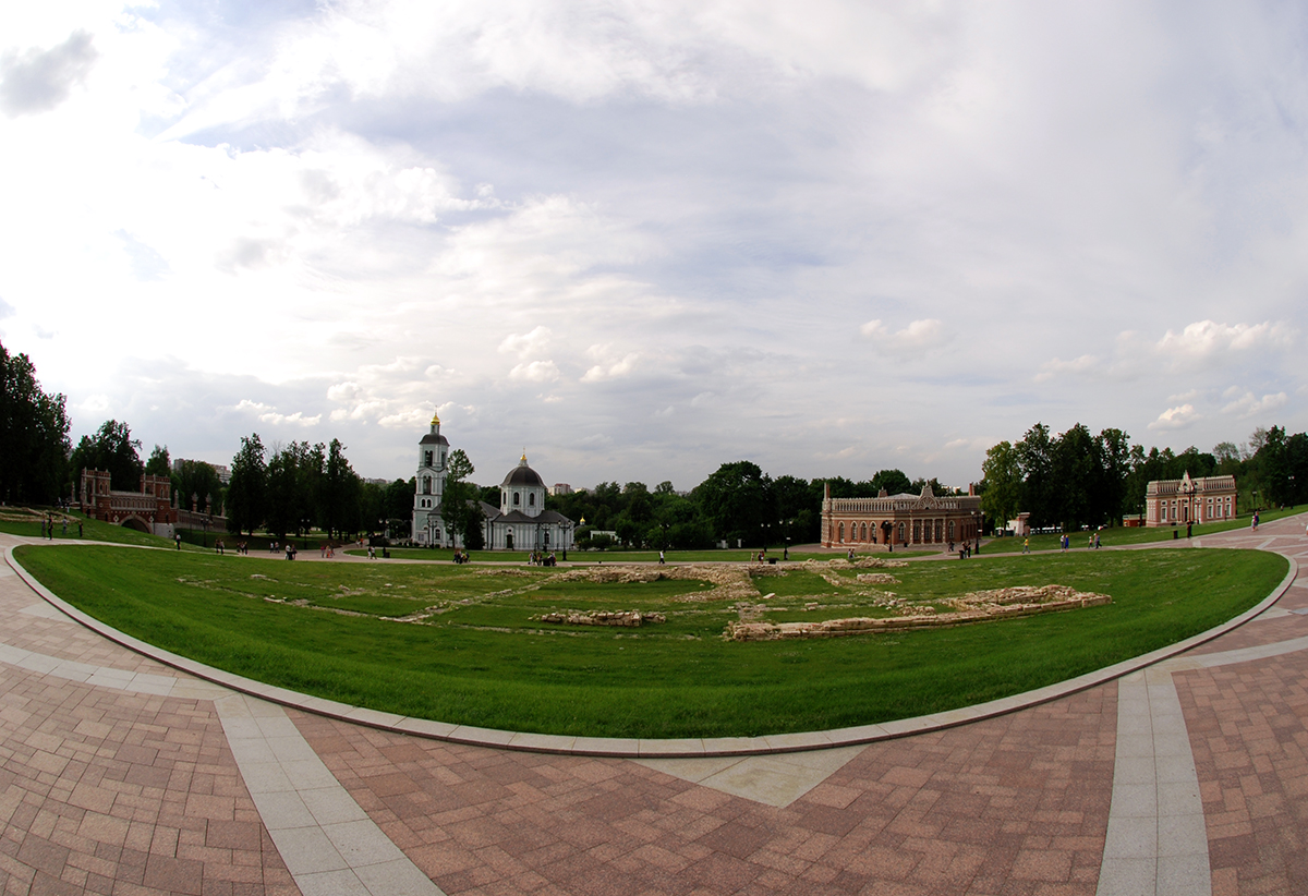 Moscow.Tsaricyno.